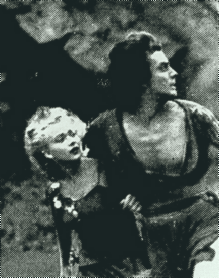 Cena do filme One Million B. C. (1940)